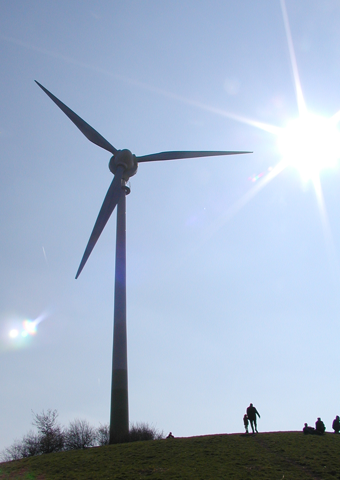 Stuttgart-Weilimdorf, Windkraftanlage auf dem "Grünen Heiner"